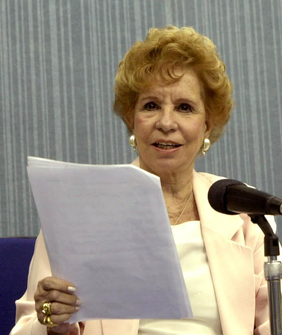 Atriz Daisy Lúcide, apresentadora da Rádio Nacional